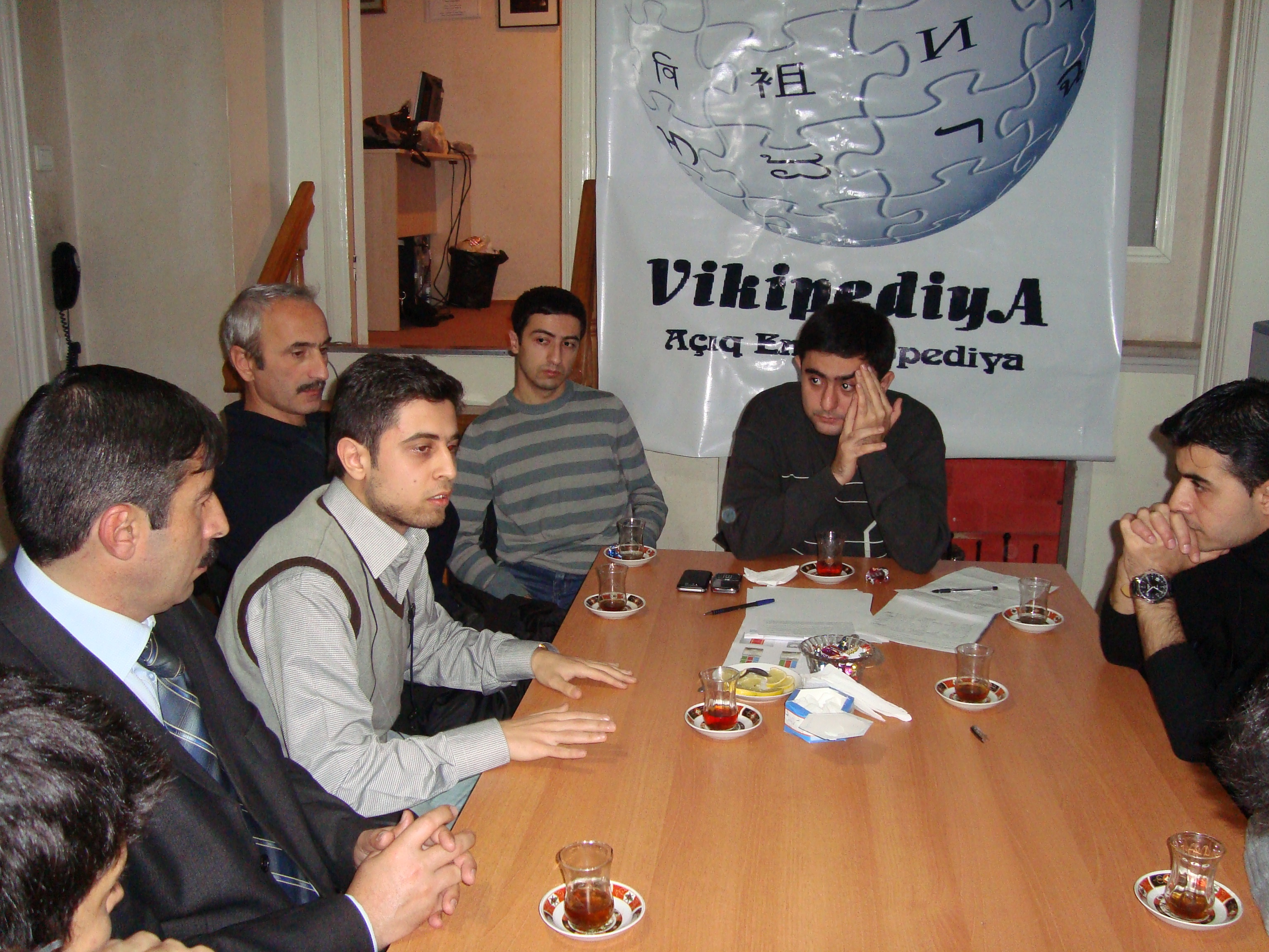 Bakıda keçirilən sayca IV vikigörüş